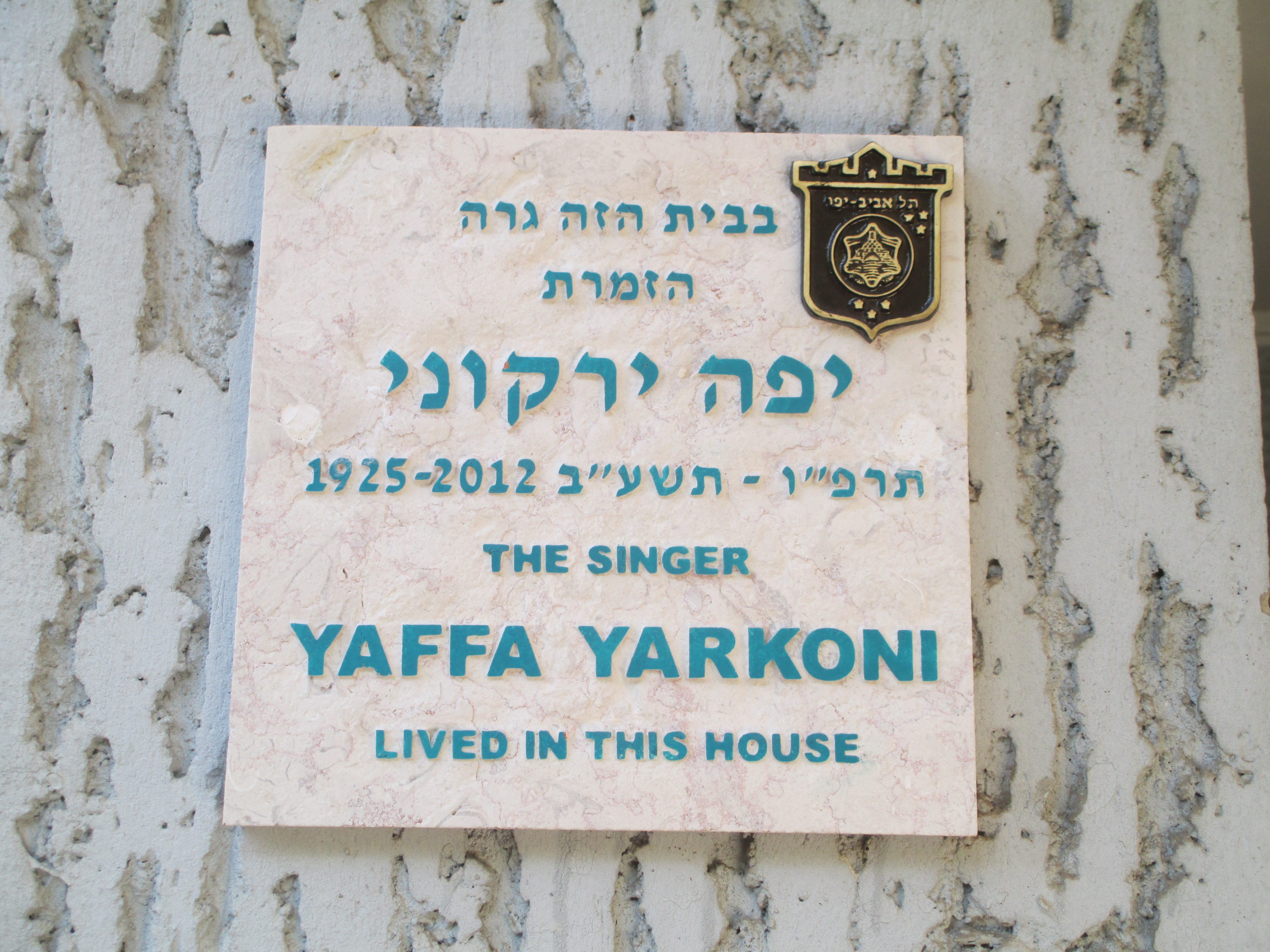 לוחית זיכרון בכניסה לביתה של יפה ירקוני בתל אביב